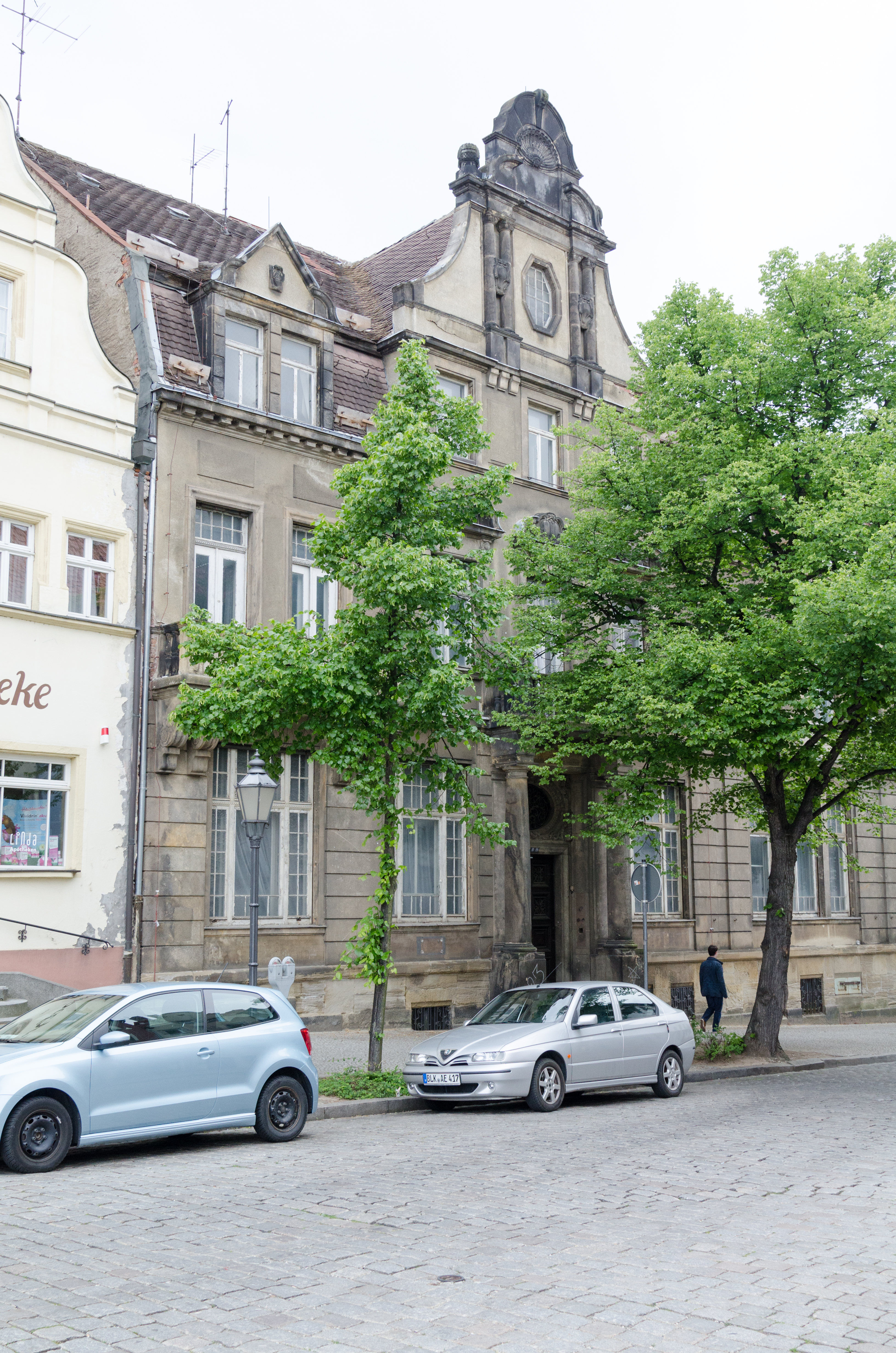 Zeitz, Brüderstraße 18, 19